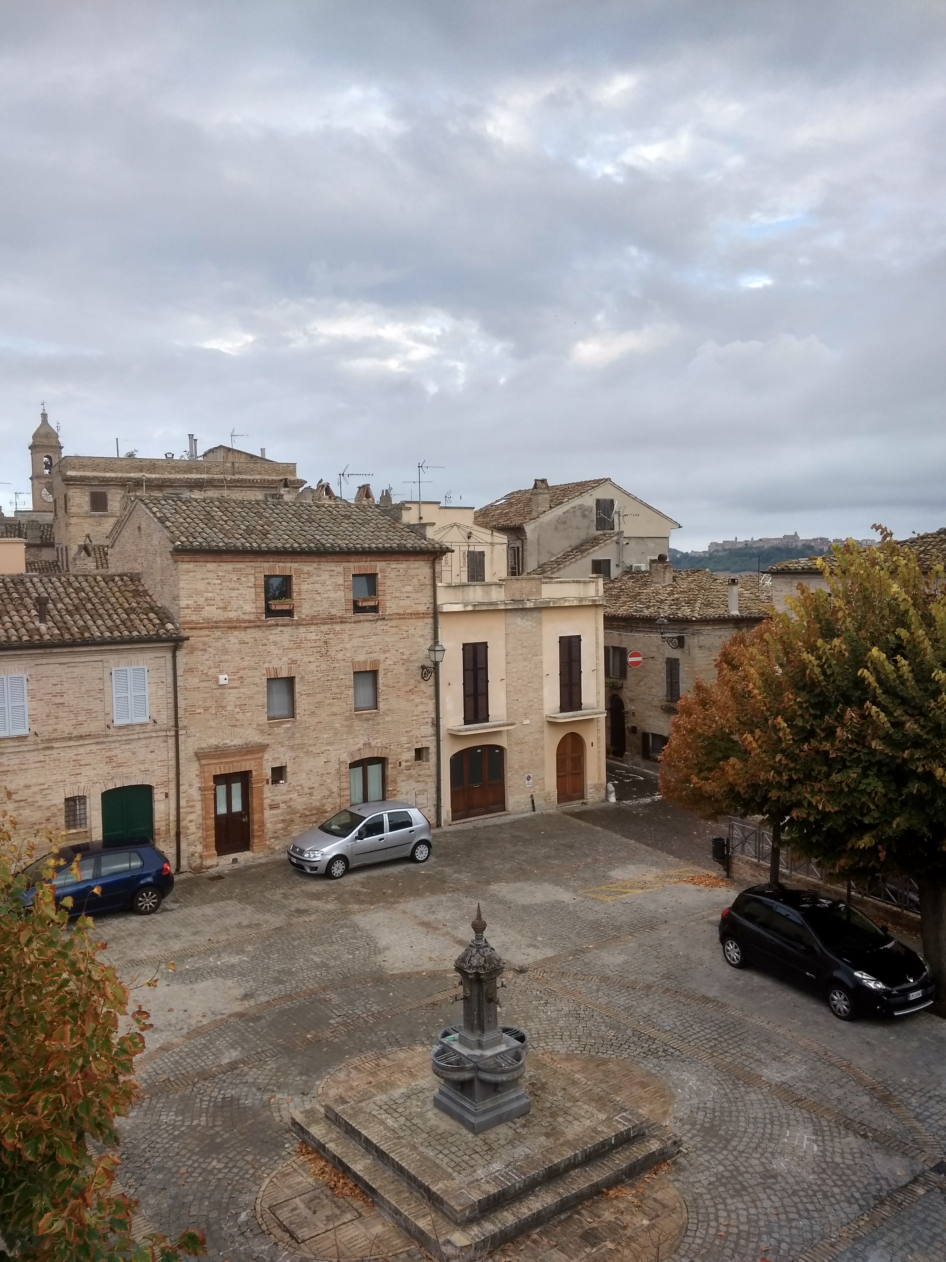 Piazza con fontana